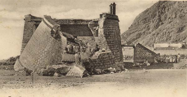 Castillo de San Andrés entre 1895-1900